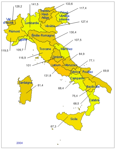 PIB par habitant (l'indice 100 étant la moyenne de l'Europe[9]).